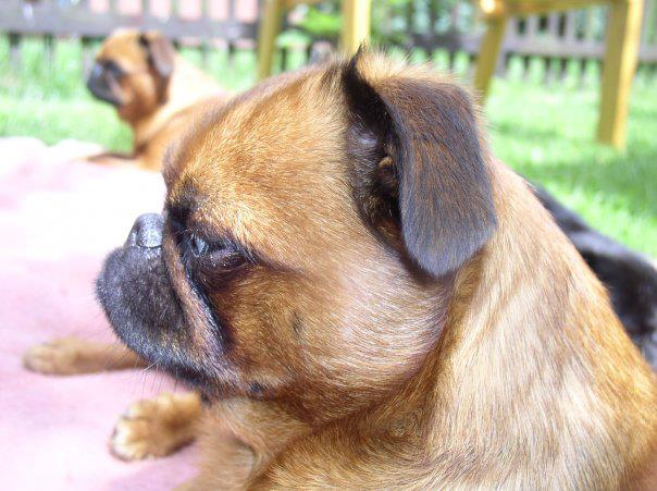 Champion Polski i Czech HASSUNASSUN LOISTO-JUTTU